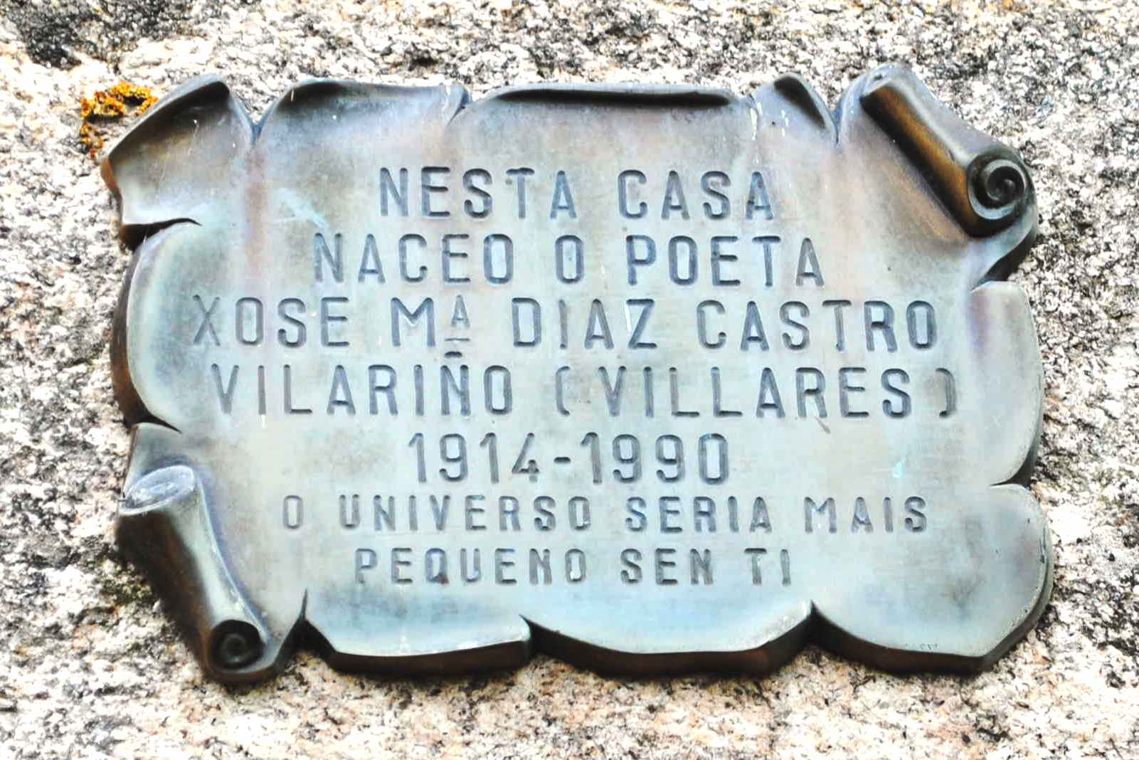 Vexa o título e as categorías.